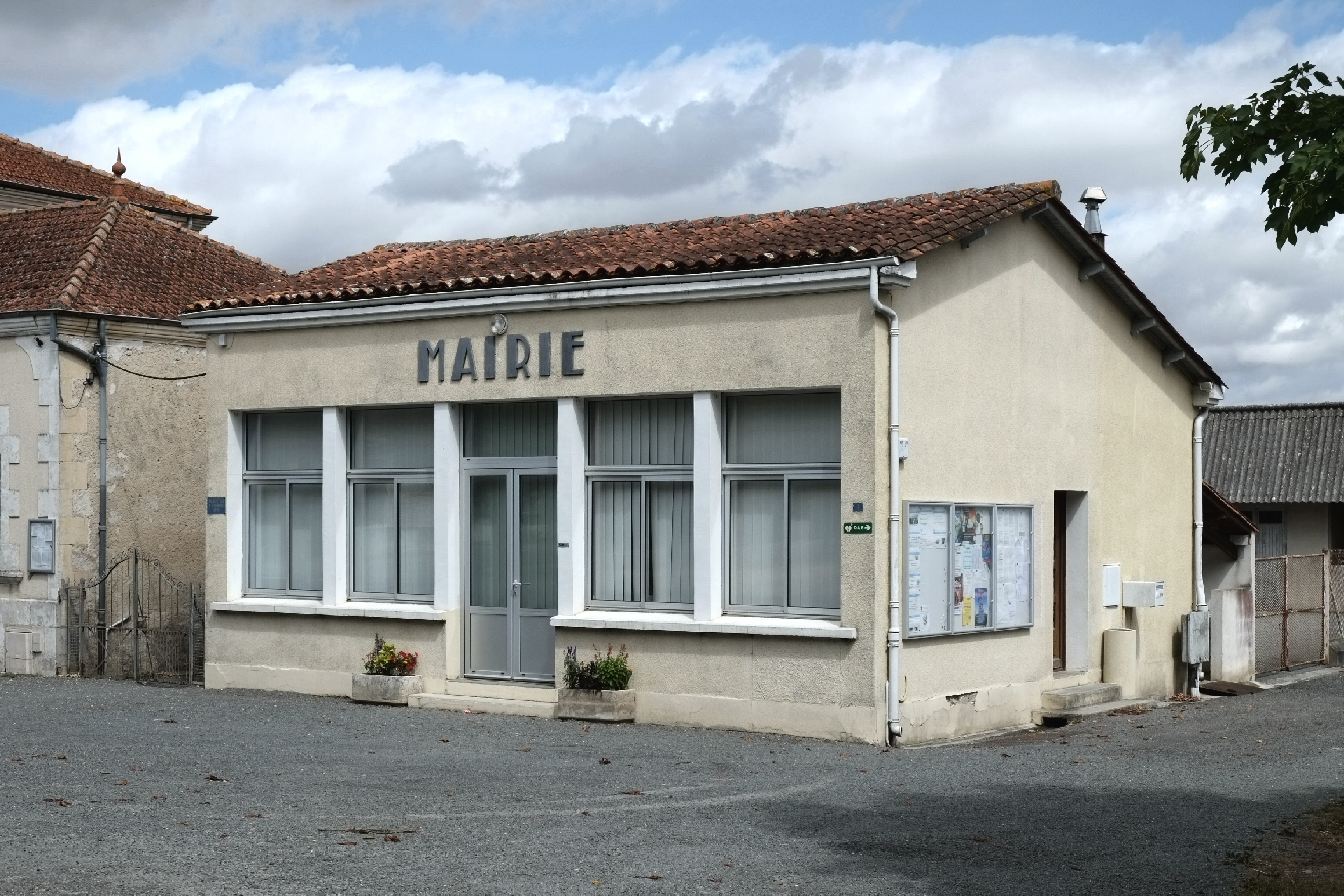 Mairie Haimps Charente-Maritime France